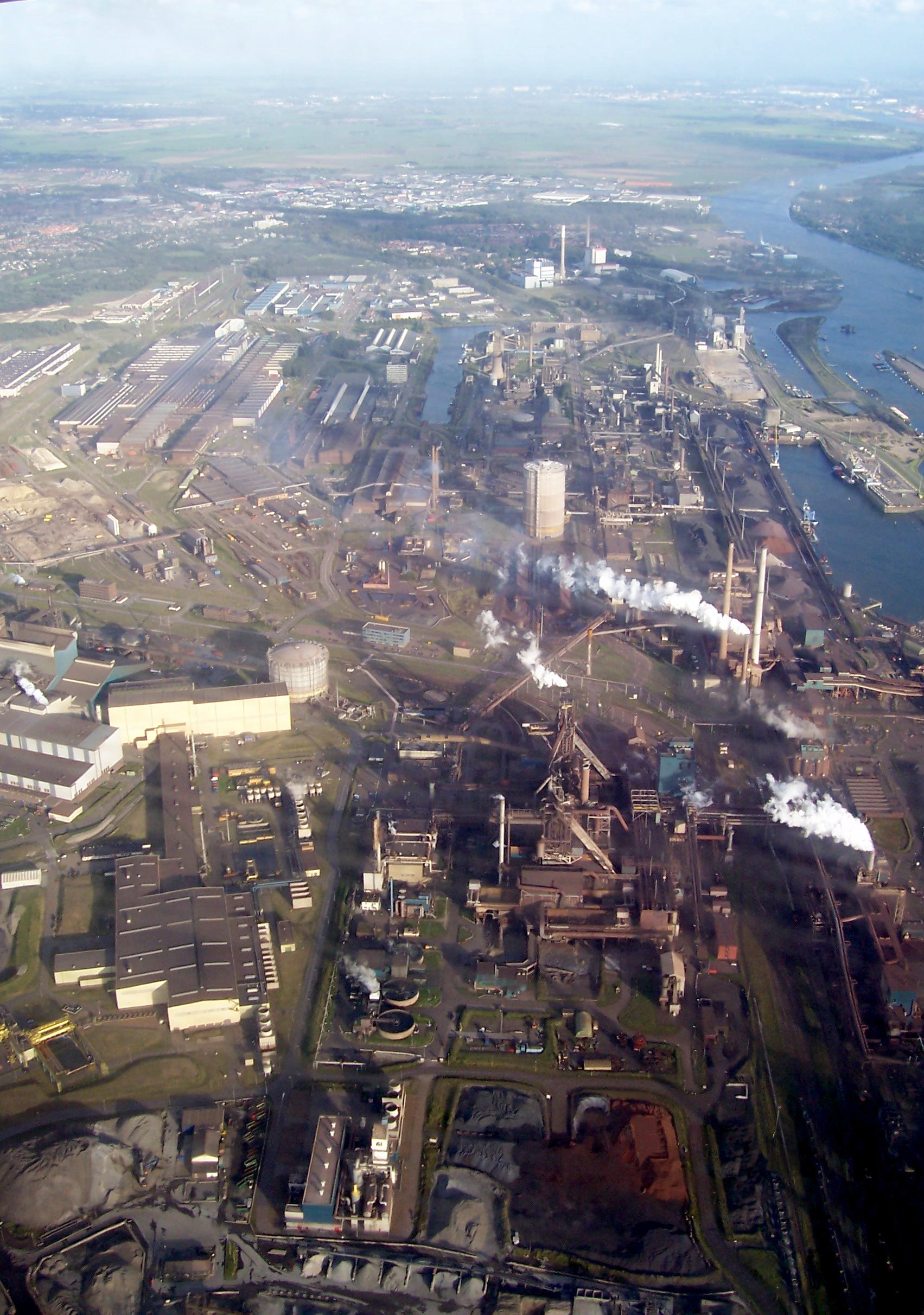 Categorie:Luchtfoto (Original text: Luchfoto van de hoogovens in IJmuiden)